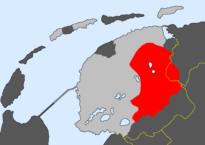 Nedersaksies: Taelgebied van et Wooldfries